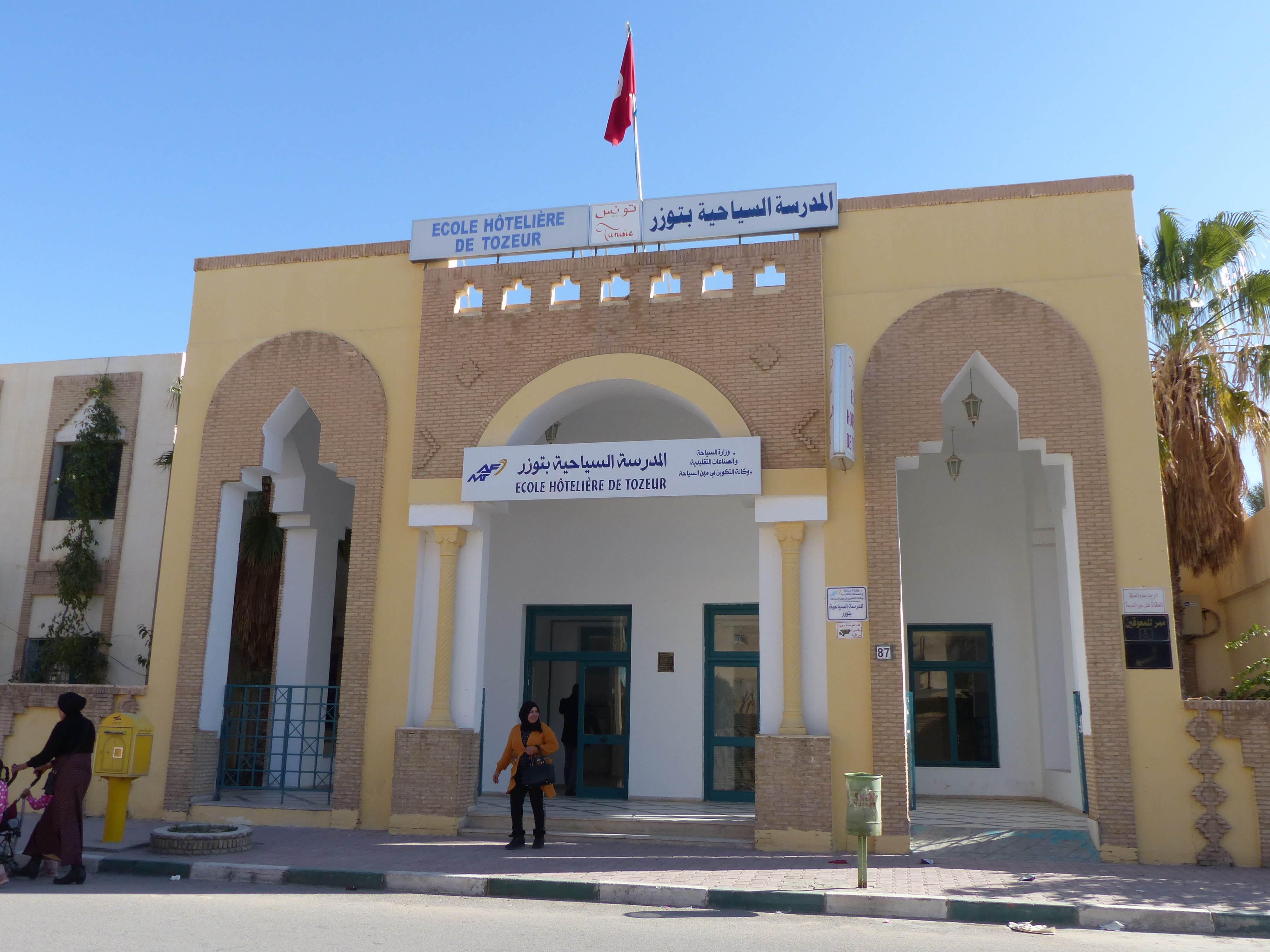 Ecole hotelière de Tozeur